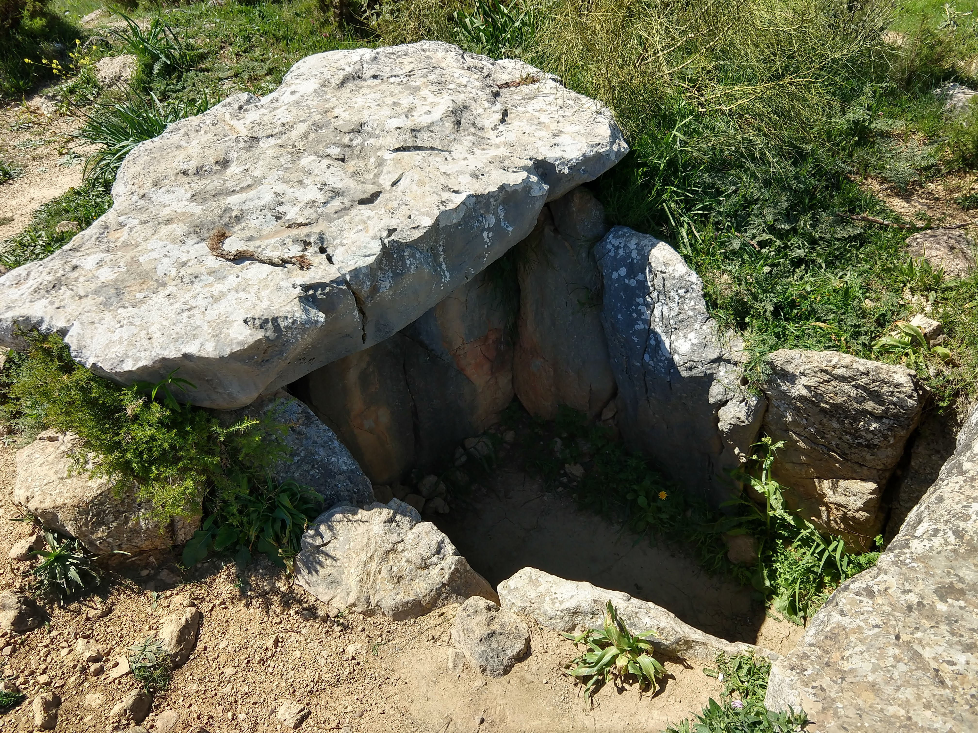 Vista superior del Dolmen del Gigante, en Montecorto, en abril de 2018.